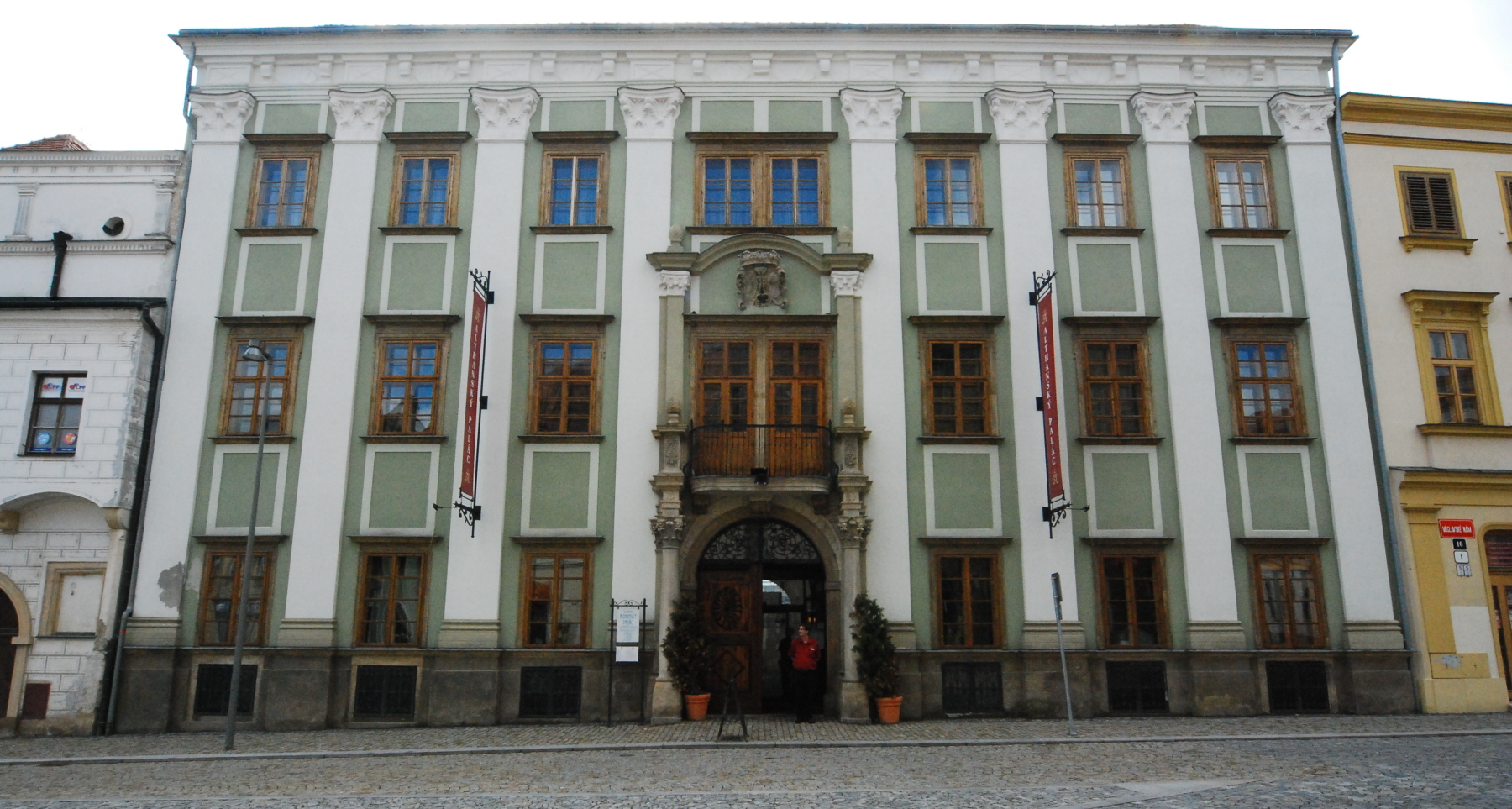 Das Althann-Palais (Starhembergpalais) - jetzt ein Hotel - auf dem Horní náměstí in Znojmo.